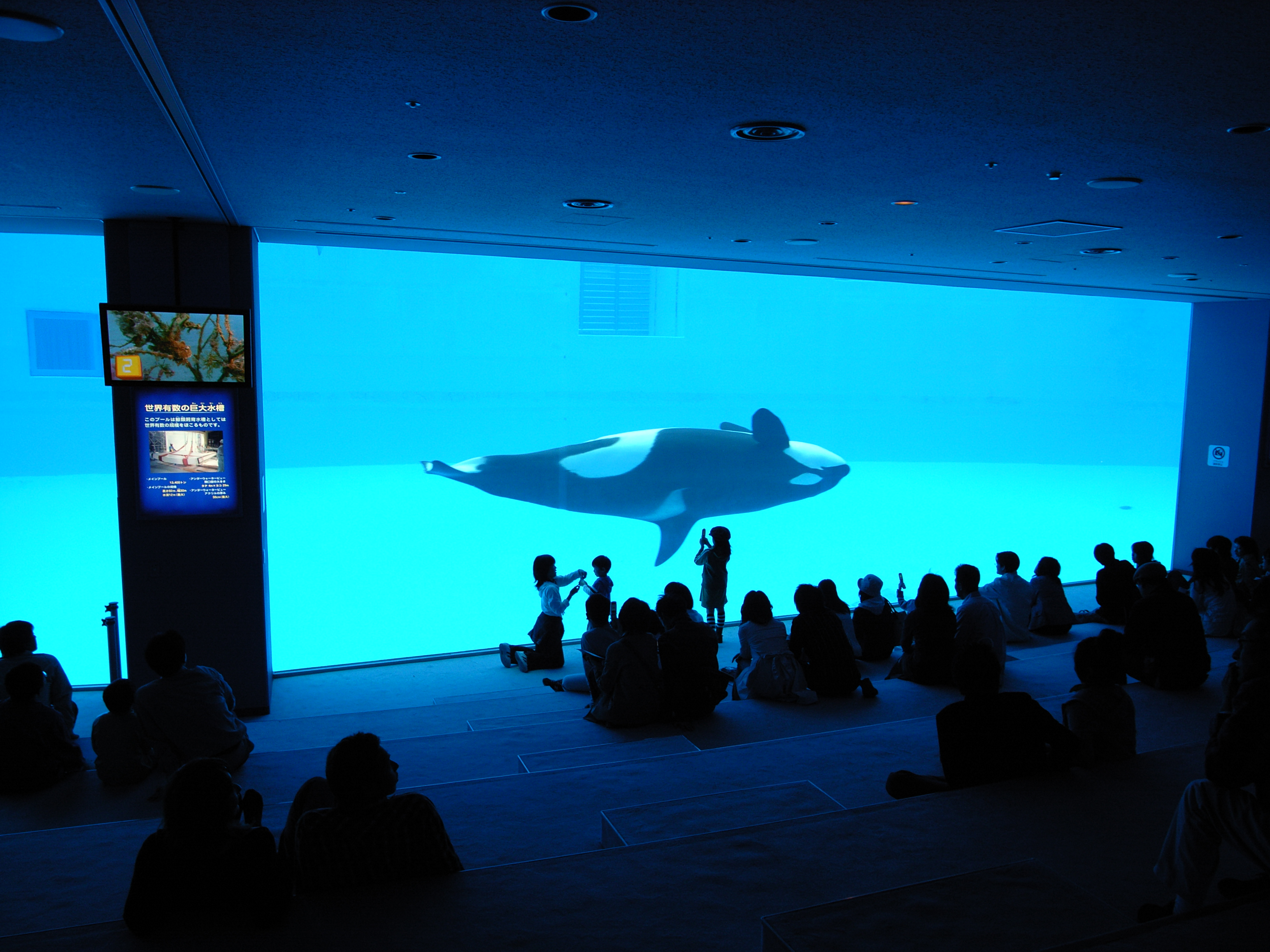 シャチ